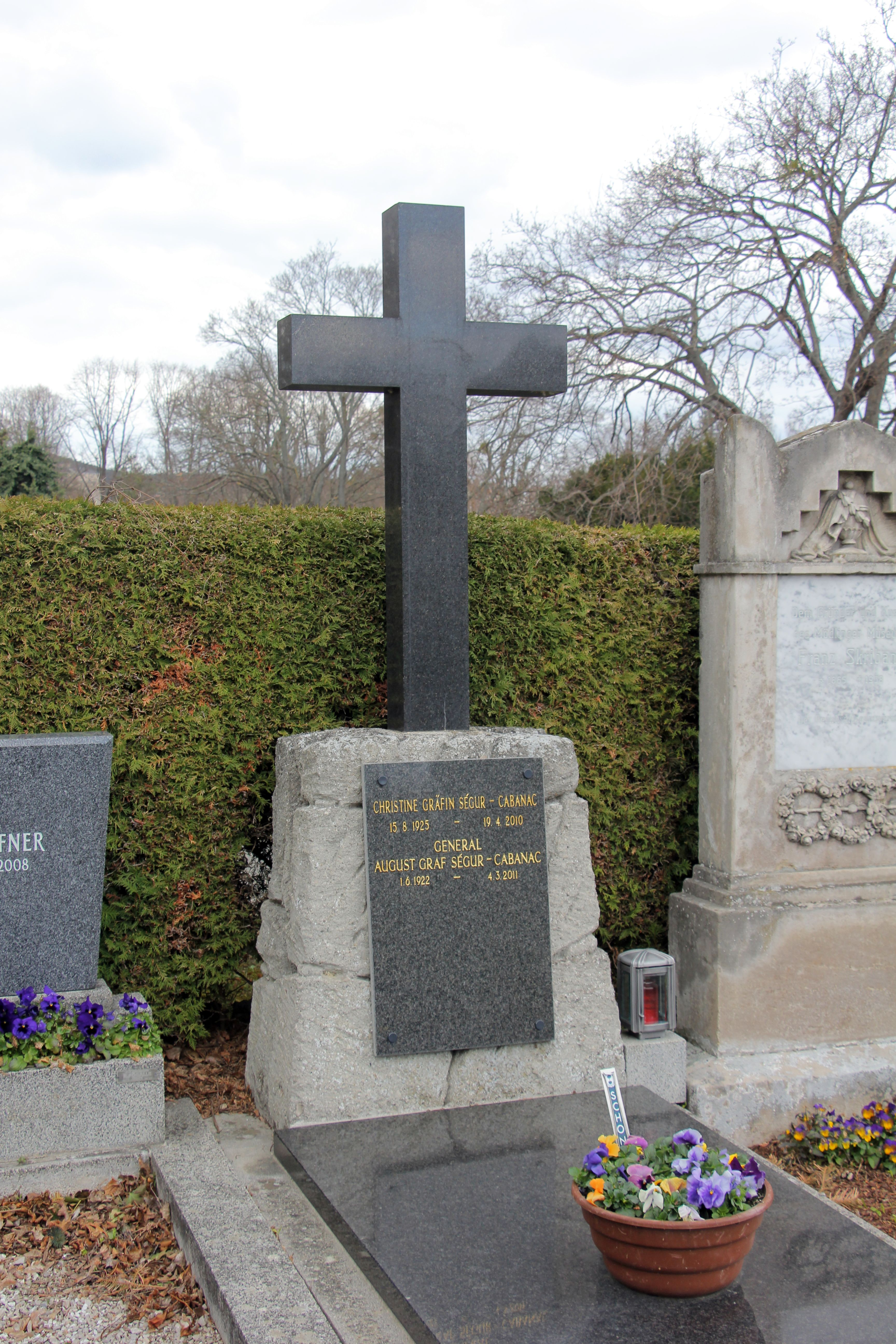 Familiengrab am Friedhof Mödling